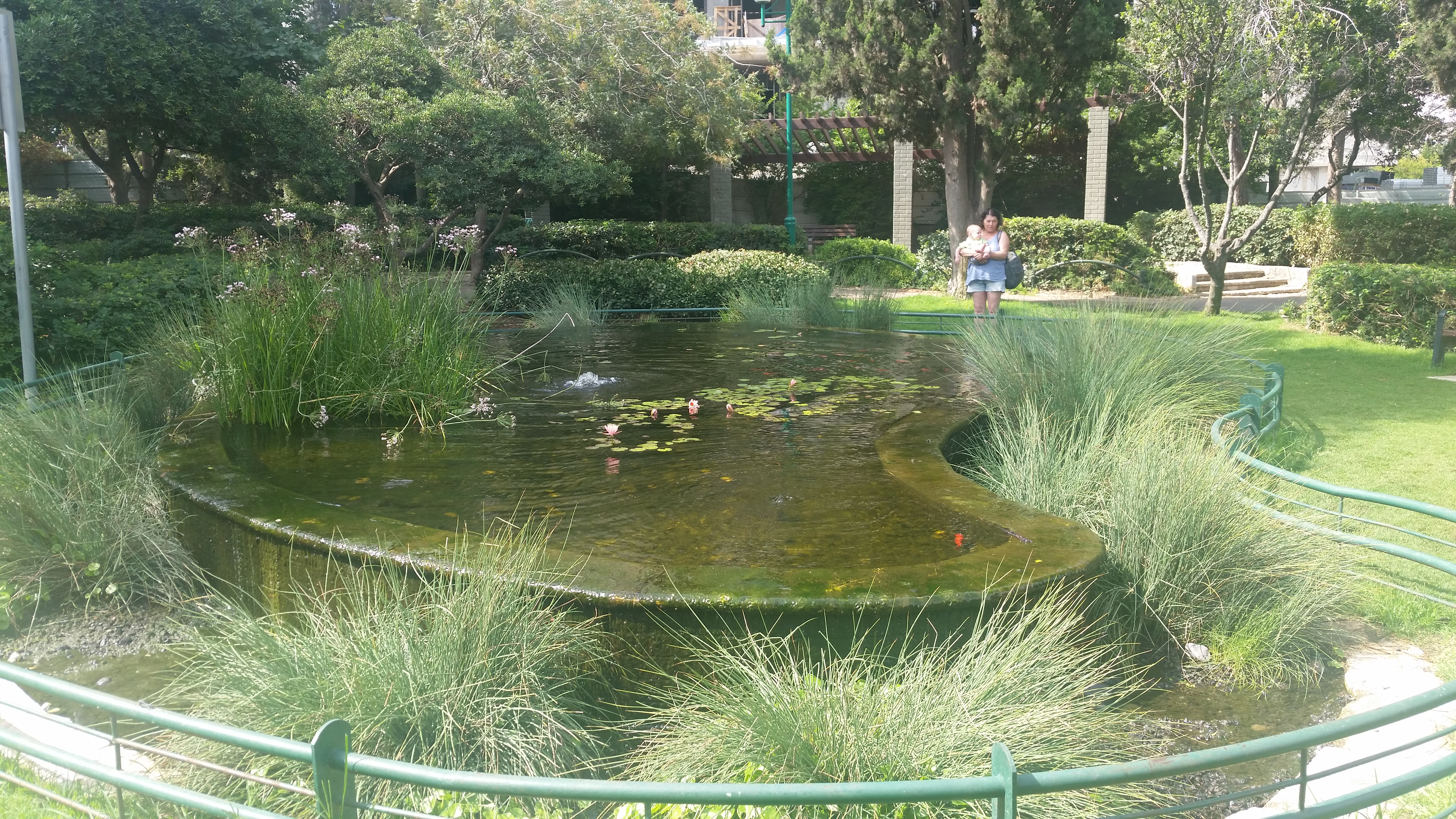 ברכת דגי נוי בגן שמואל הכהן בכיכר הינרייך היינה בכרמל